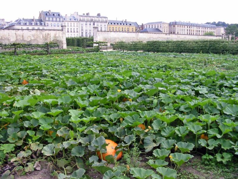 Le potager du roi à Versailles Source Photo JH Mora juillet 2004